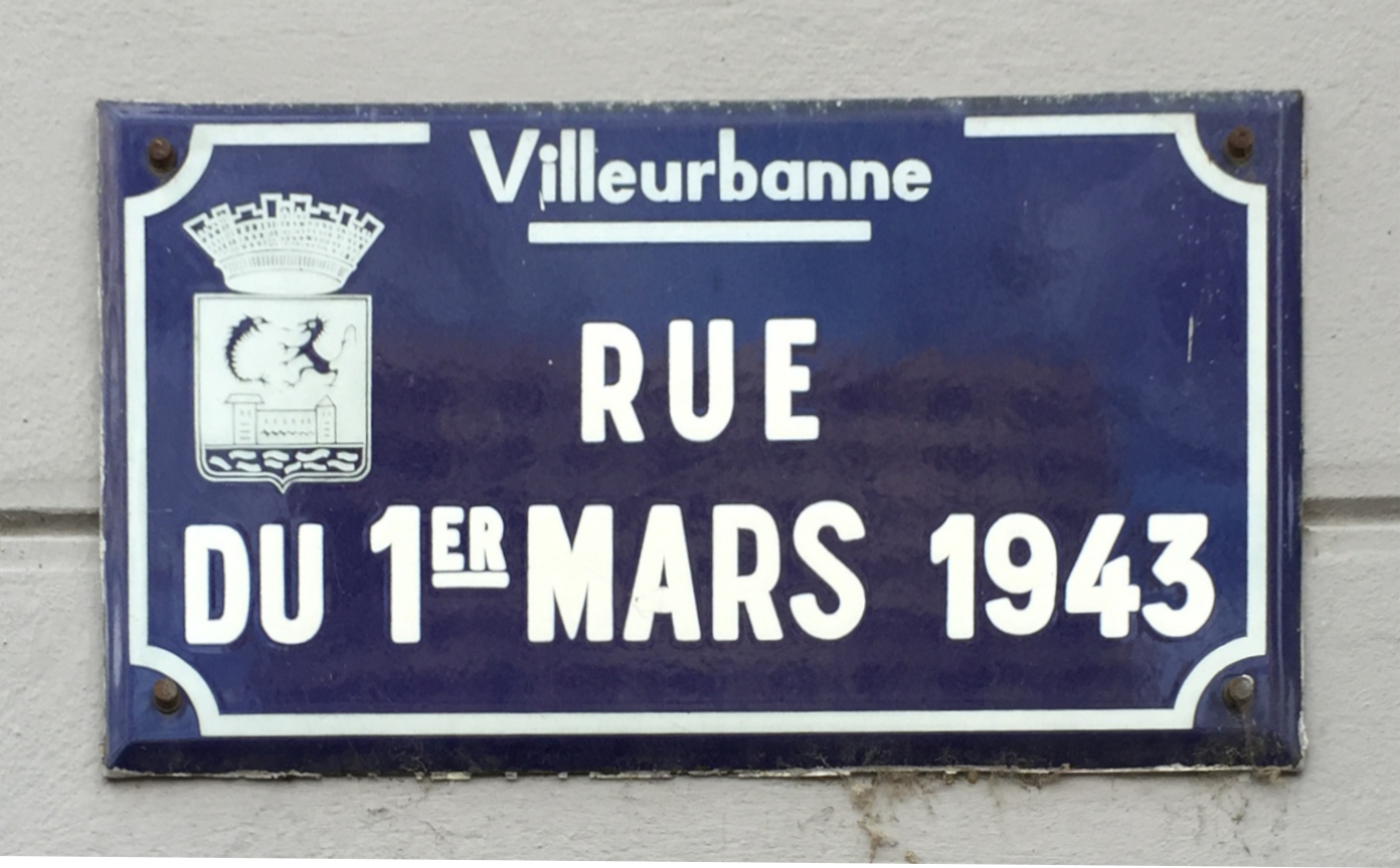 Rue du premier-mars-1943 à Villeurbanne. La rafle des Villeurbannais a eu lieu le 1er mars 1943. Voir également cette plaque. This photograph was taken with an iPhone 6